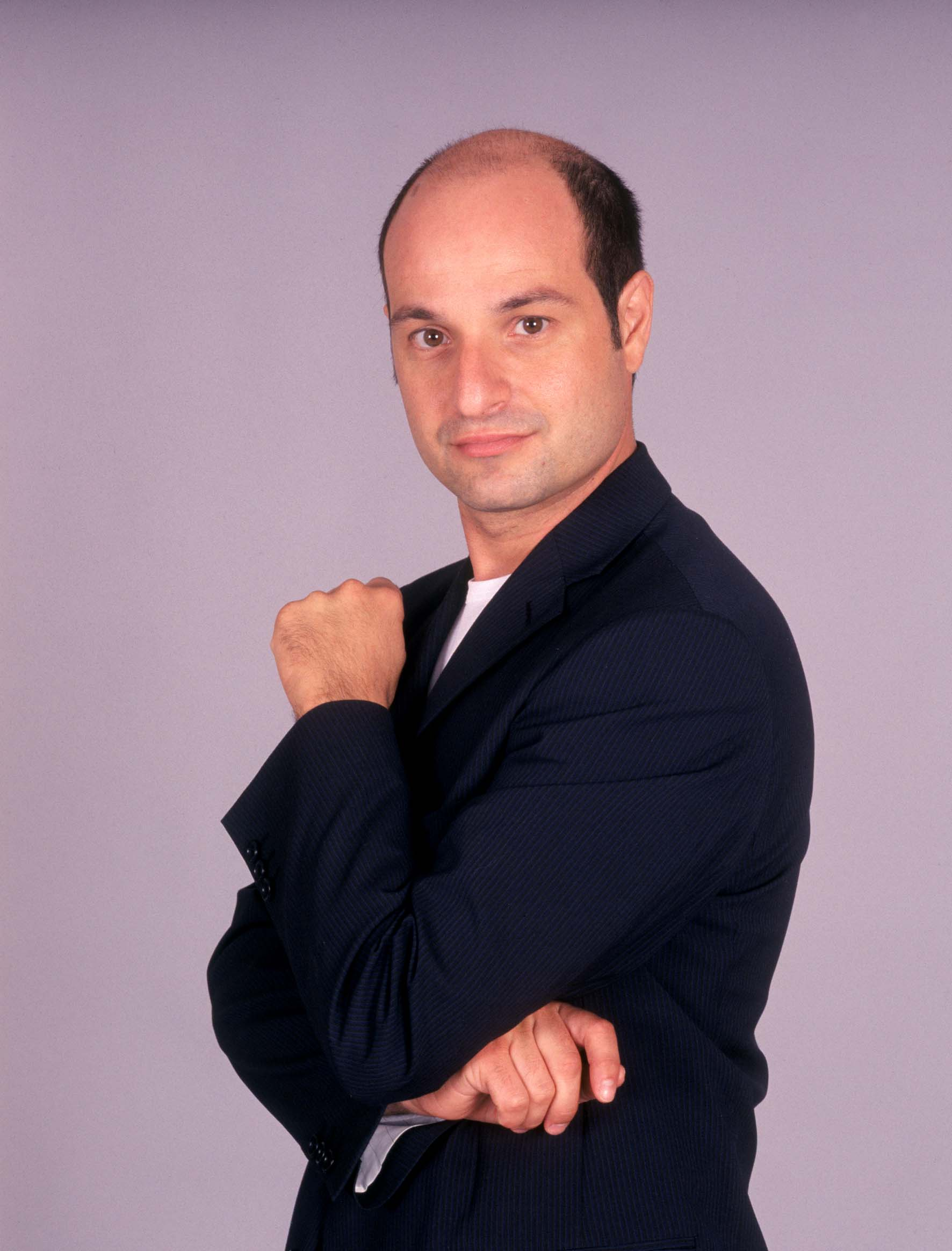 Cedutomi dal Signor Gianluca Ramazzotti, via email che intende cederlo per licenza cc-by-sa. A breve arriverà l'autorizzazione per caricarla su commons. Nell'attesa vi porgo i miei distinti saluti --Lodewijk Vadacchino (msg) 12:57, 4 gen 2009 (CET) Ticket:2009010410006236